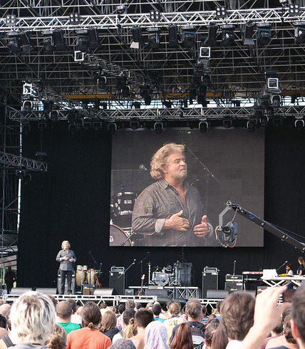 Peppe Grillo a Woodstock 5 stelle